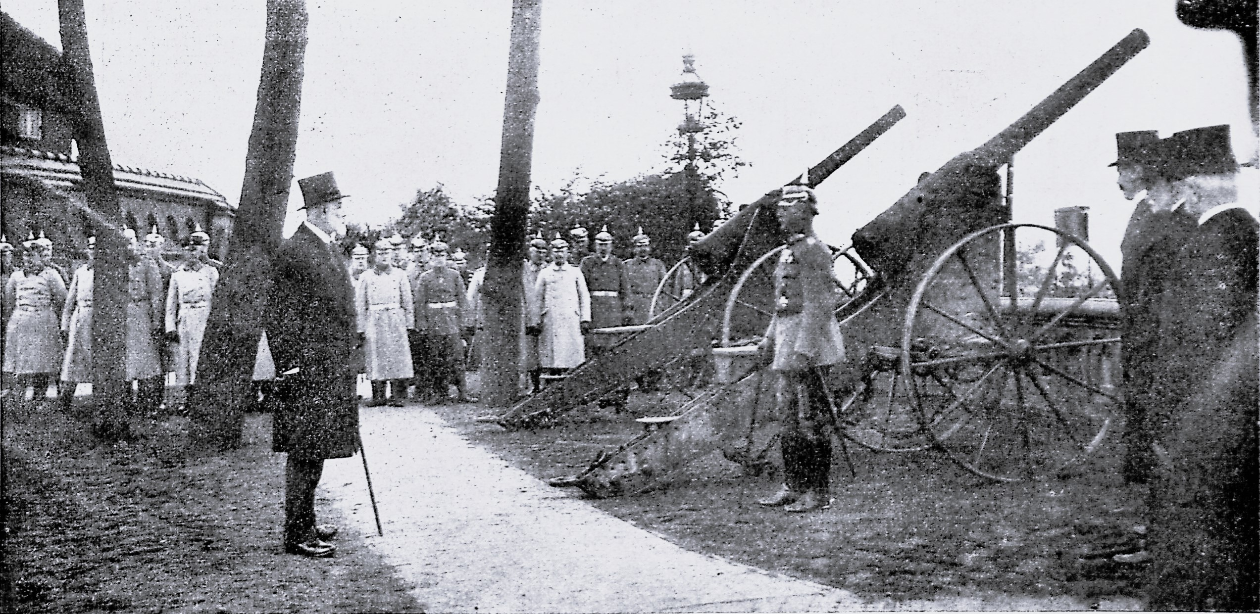 Übergabe zweier französischer Beutegeschütze, Modell “De Bange 90mm cannon” in Festungslafette. Ansprache des Generalmajors v. Wright.